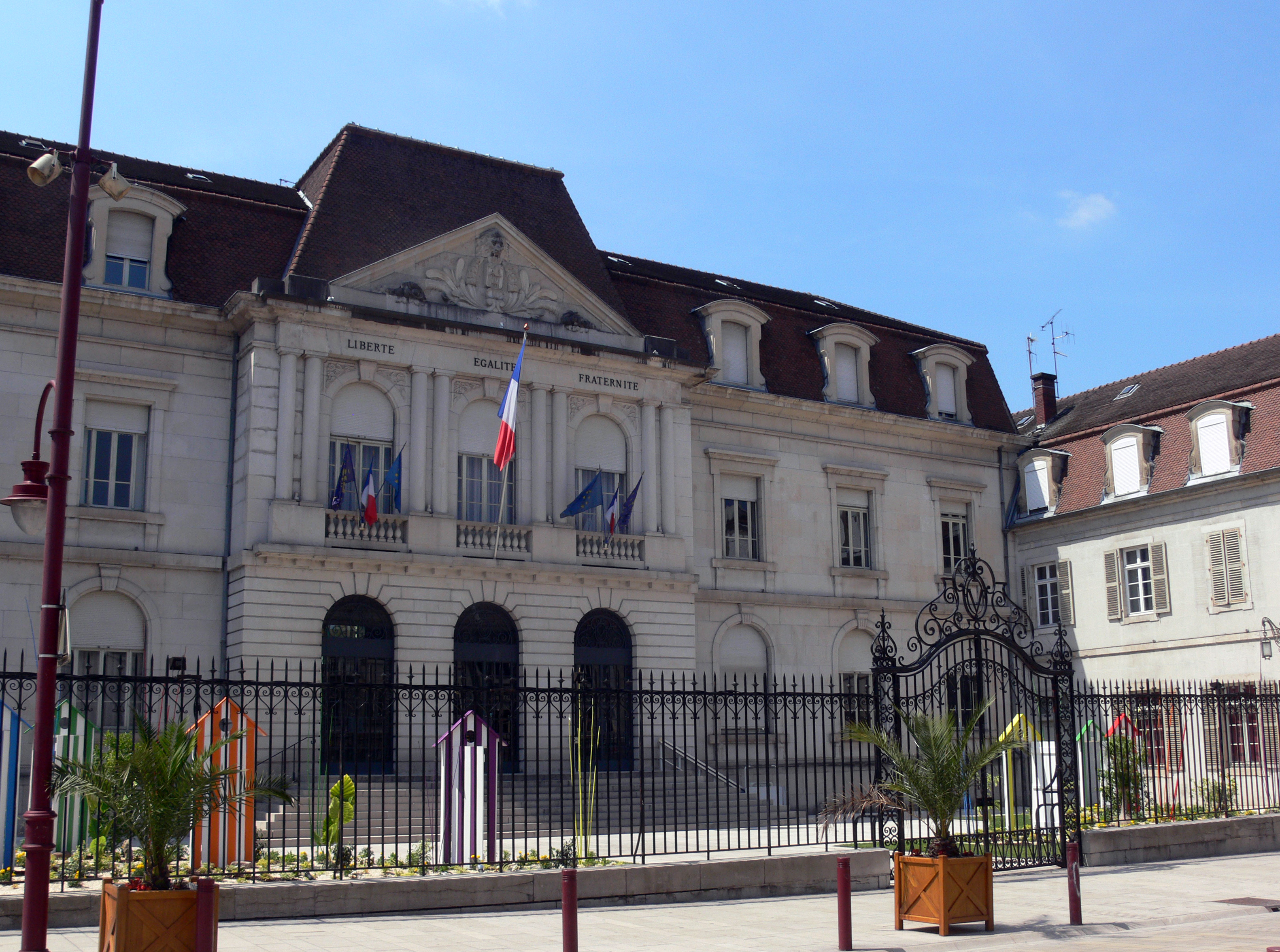 Hôtel de ville de Vesoul (ancien hôpital), façade principale